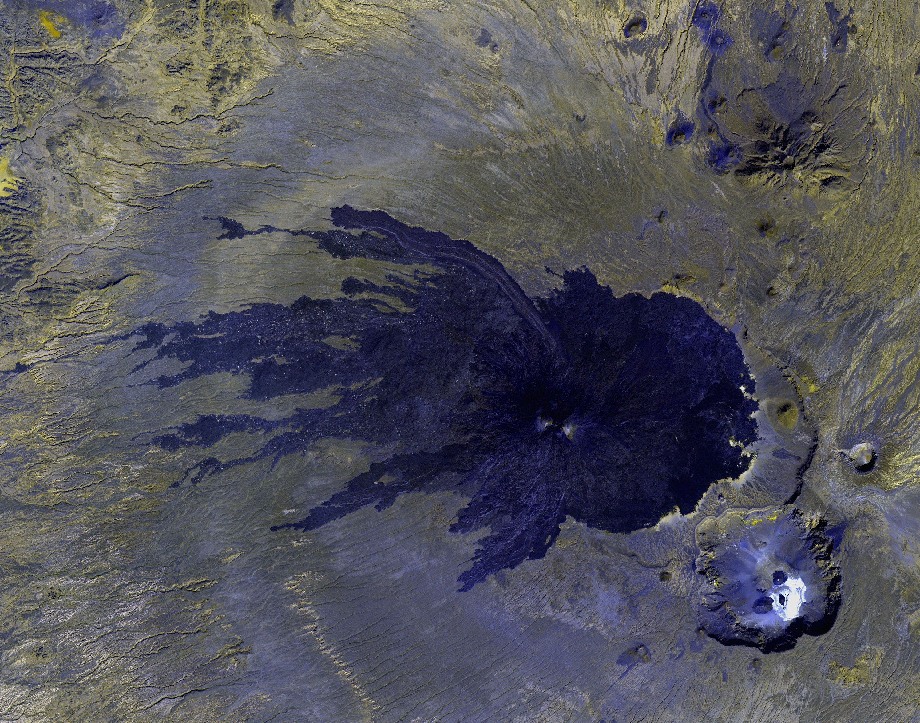 Le Pic Toussidé, vue satellite par TerraLook ASTER (date 2006-01-20)